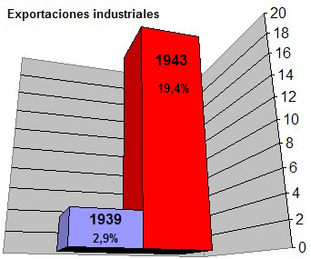 Graphic. Argentina. Porcentaje de exportaciones industriales sobre el total 1939-1966